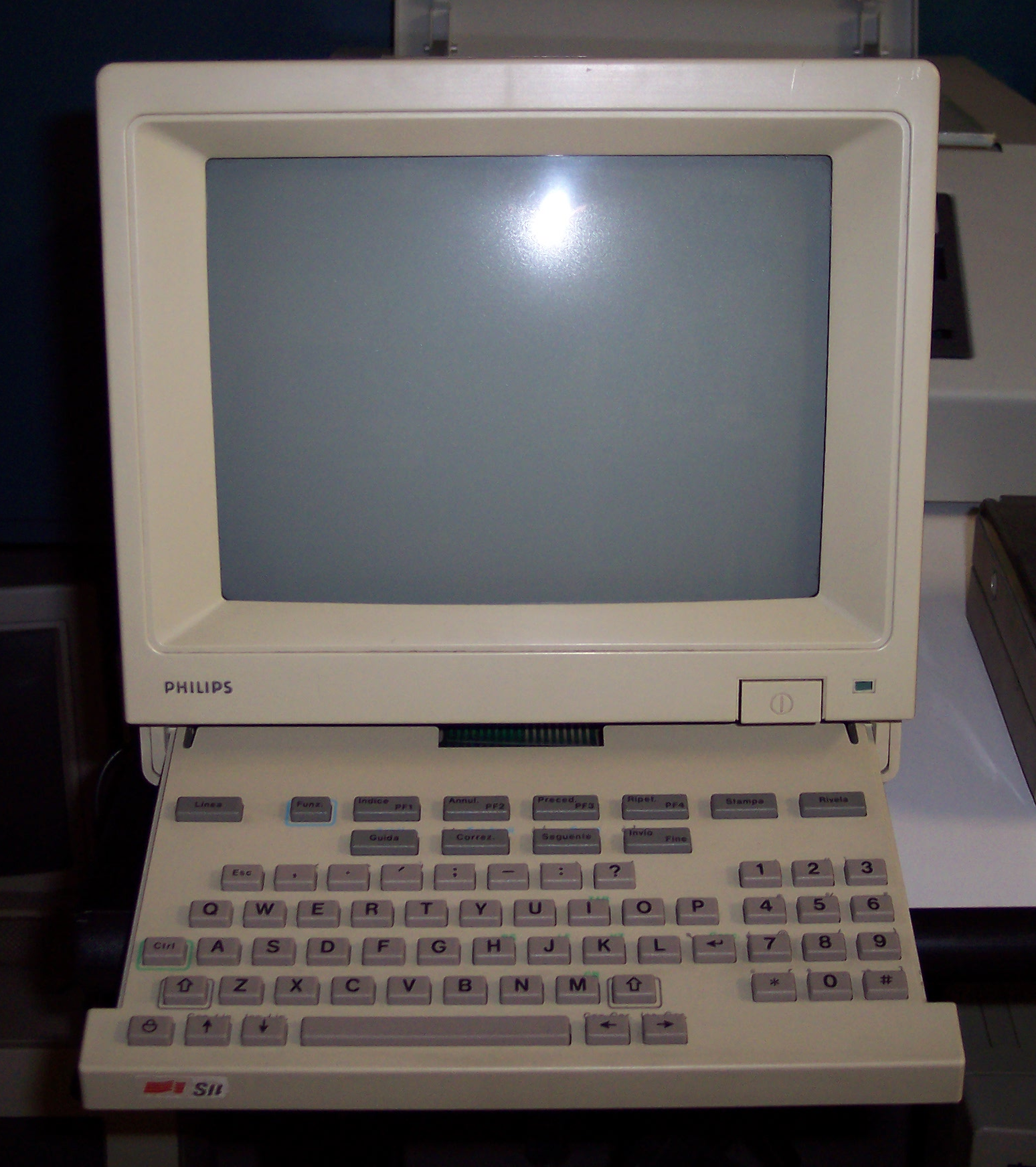 Un videoterminale Philips, rimarchiato SIP, in grado di allacciarsi alla linea Videotel italiana fornita dalla SIP. Si ringrazia l'associazione Verdebinario per la disponibilità